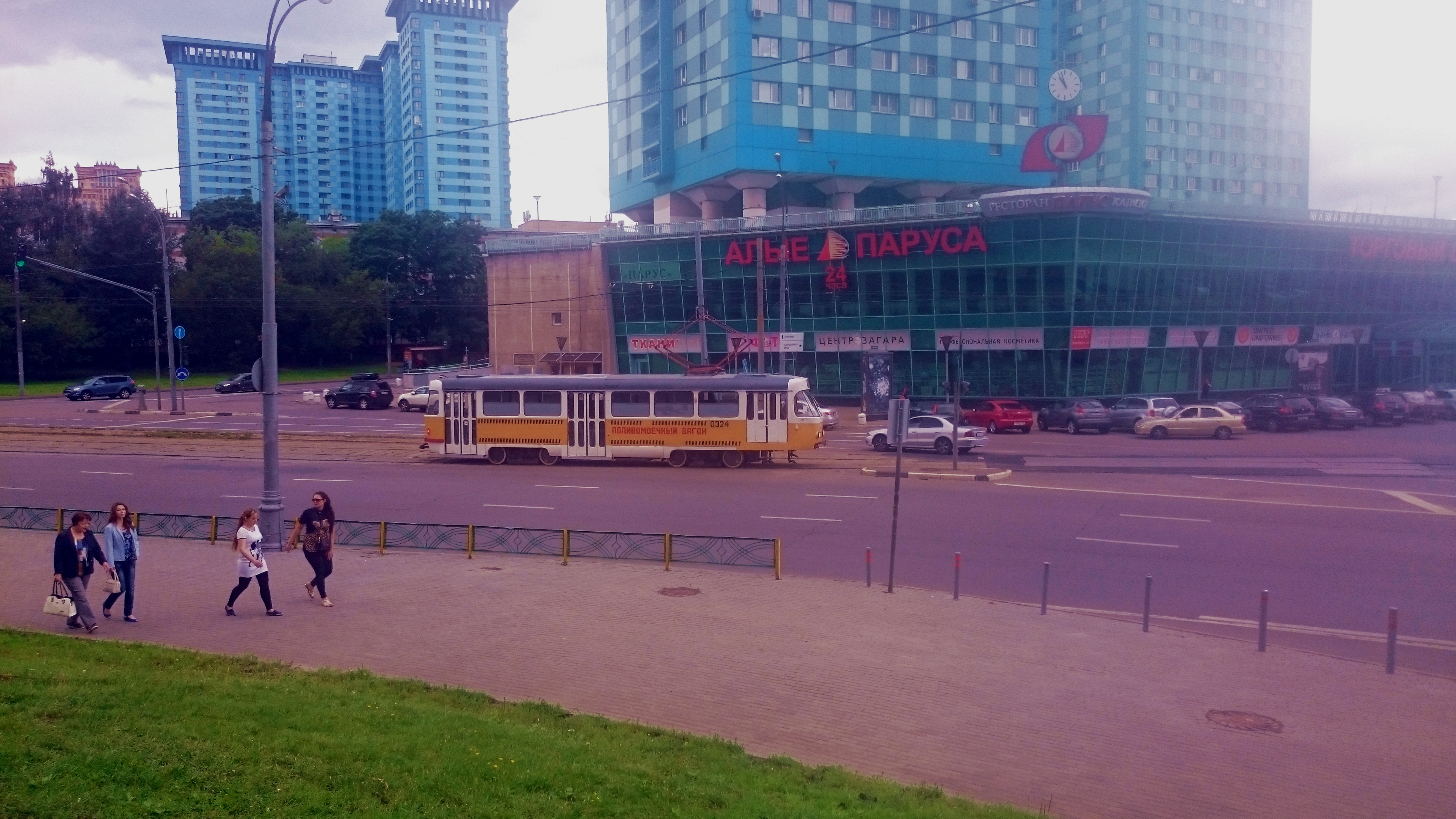 Поливальная машина на базе трамвая Tatra T3.